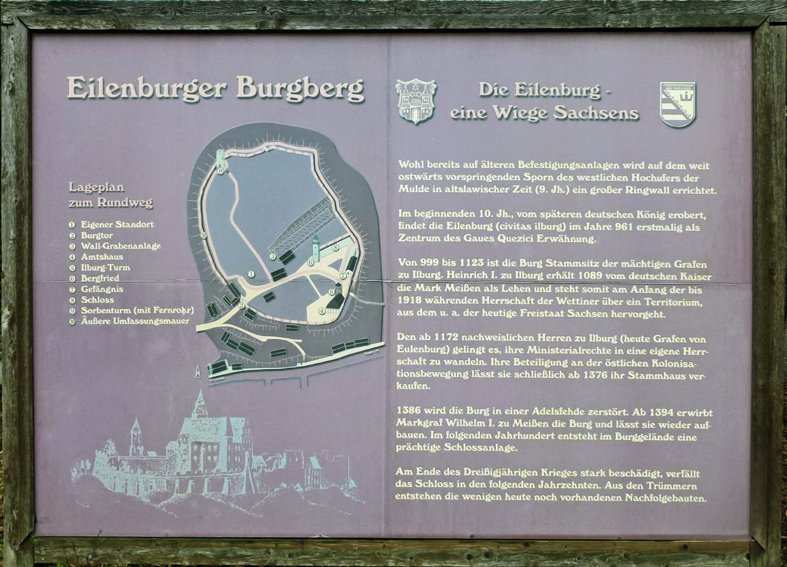 Informationstafel auf dem Eilenburger Burgberg